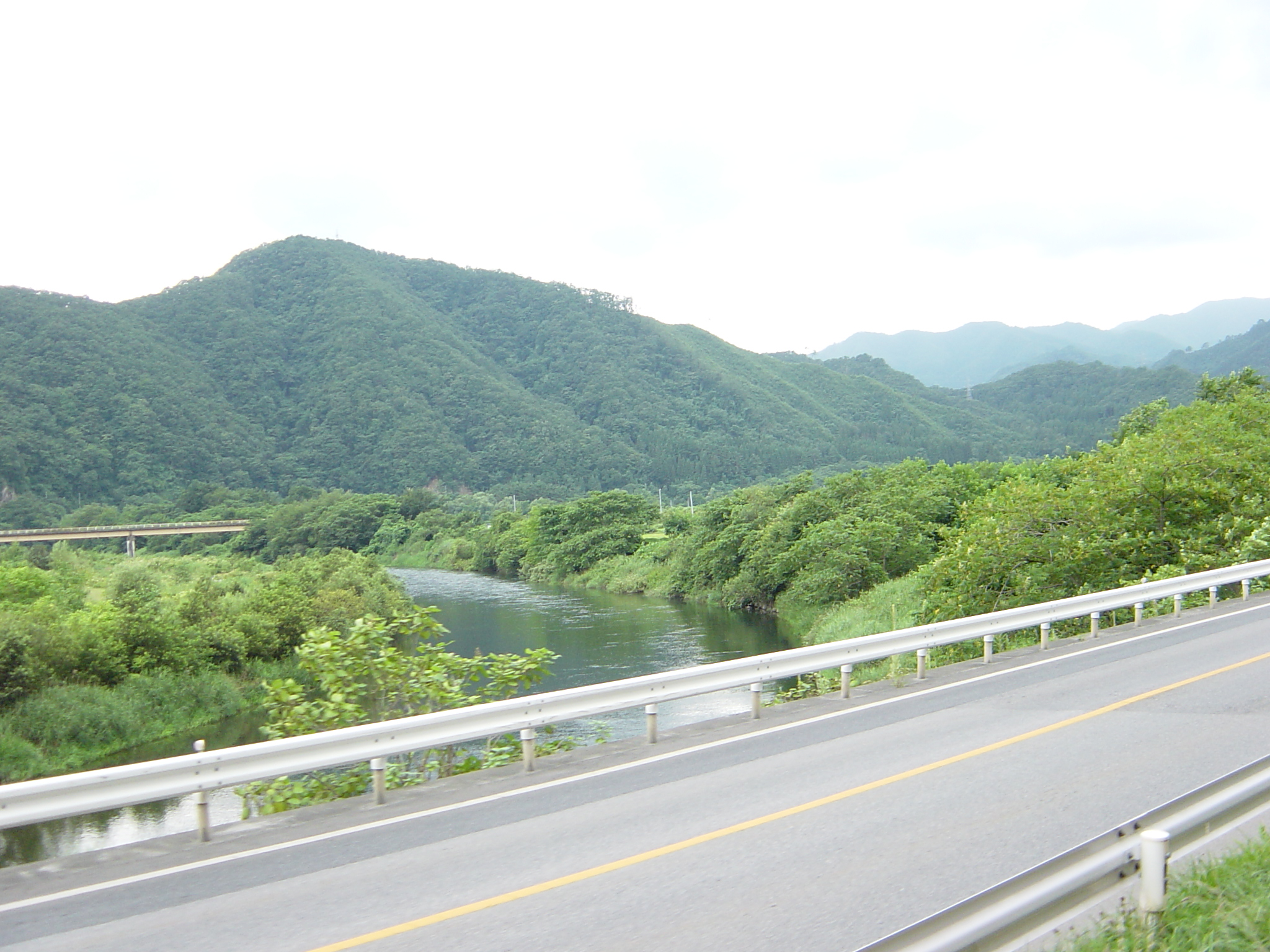 閉伊川